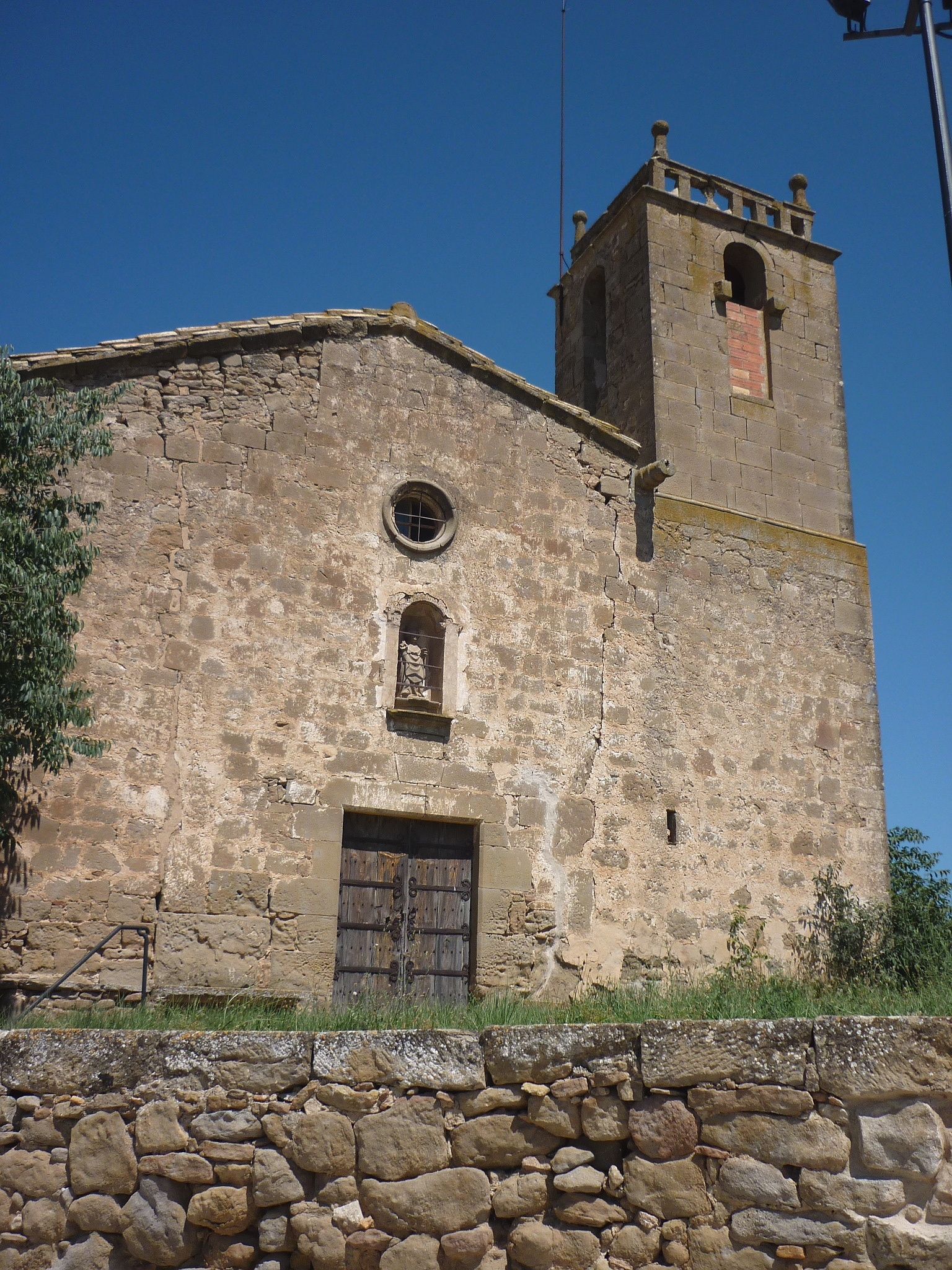 Església parroquial de Santa Maria del nucli de Sant Serni, municipi de Torà